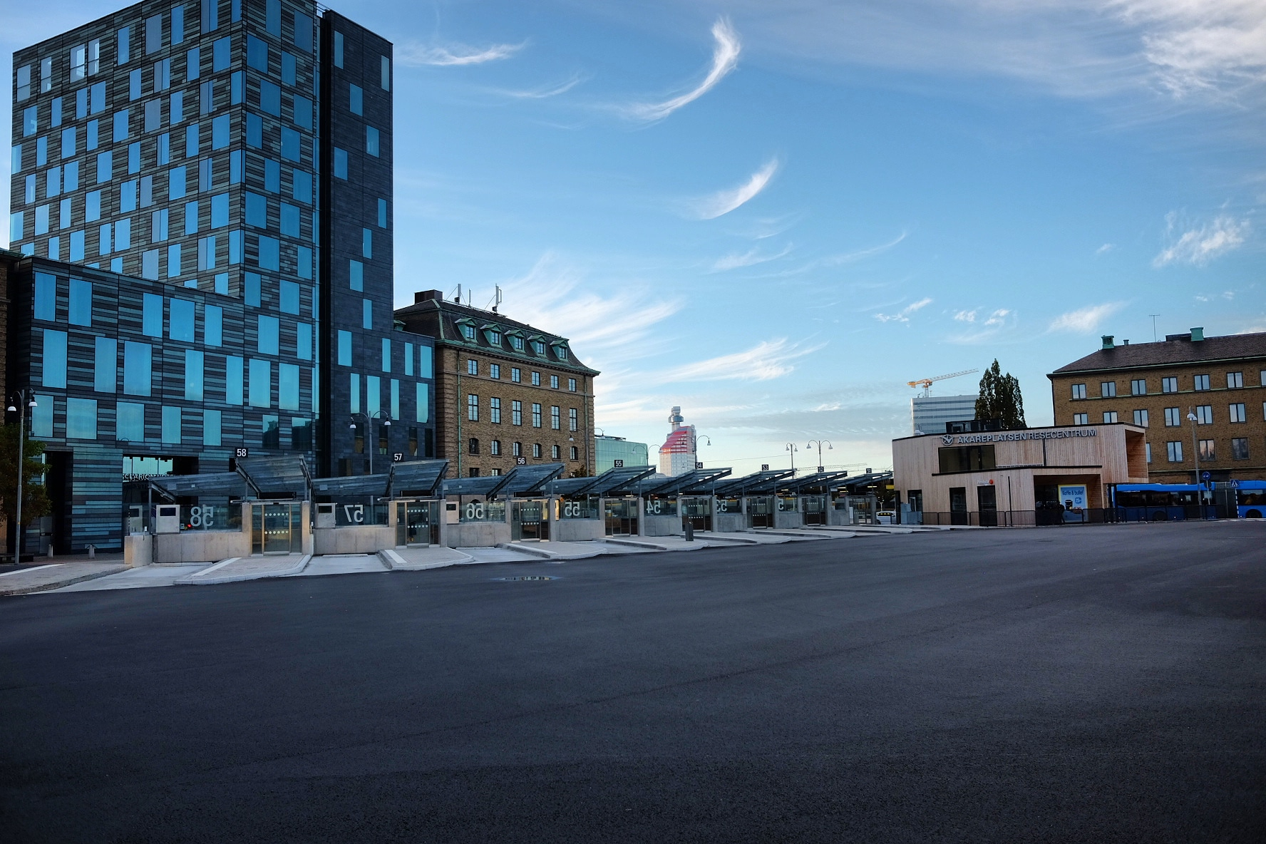 Åkareplatsen resecentrum, Göteborg.